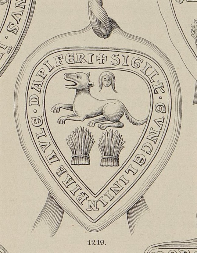 Ältestes Siegel des Geschlechts Wolfenbüttel-Asseburg von 1219. Nachzeichnung des Orginals. Siegel des kaiserlichen Hof-Truchsess Gunzelin von Wolfenbüttel (um 1170–1255), auch von Peine genannt. Umschrift: „+ SIGILL' · GVNCELINI INPIAL' AULE · DAPIFERI“. Das Siegel zeigt einen Wolf zum Sprung ansetzend über zwei Garben, sowie über dem Wolf ein Kopf mit langen Haaren.